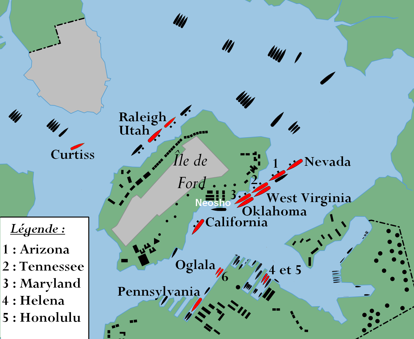 plan des navires lors de l'attaque de Pearl Harbor avec rajout position Neosho